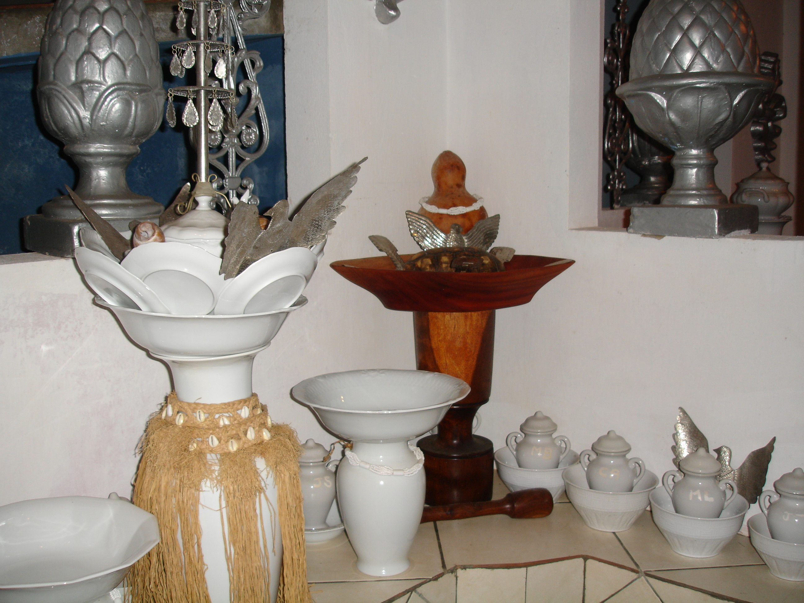 Acento de Ayrá